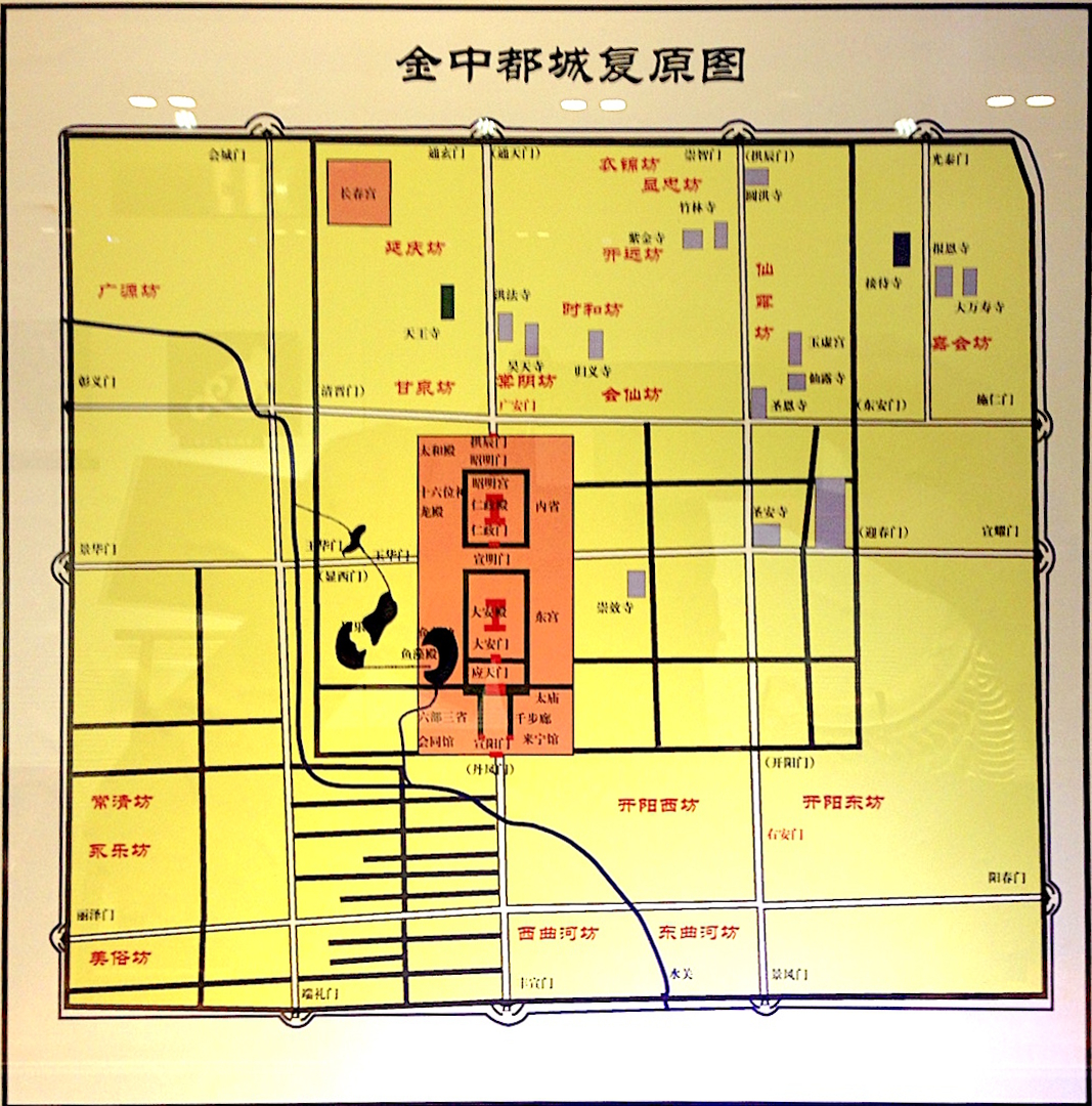 Karta över Zhongdu